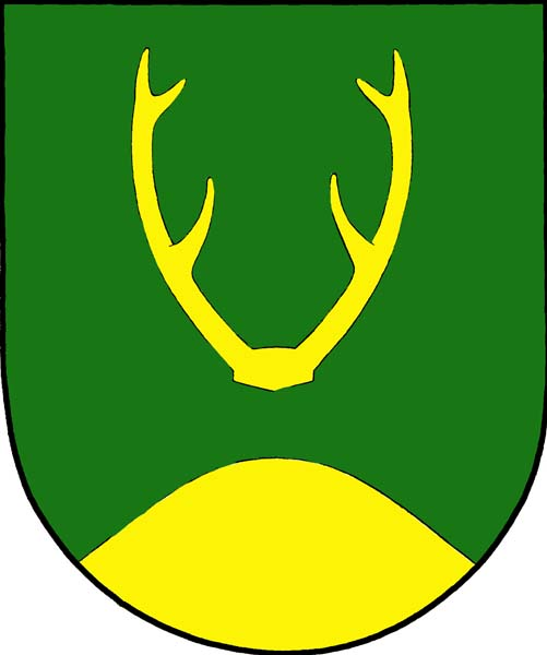 Znak obce Srní (okres Klatovy)